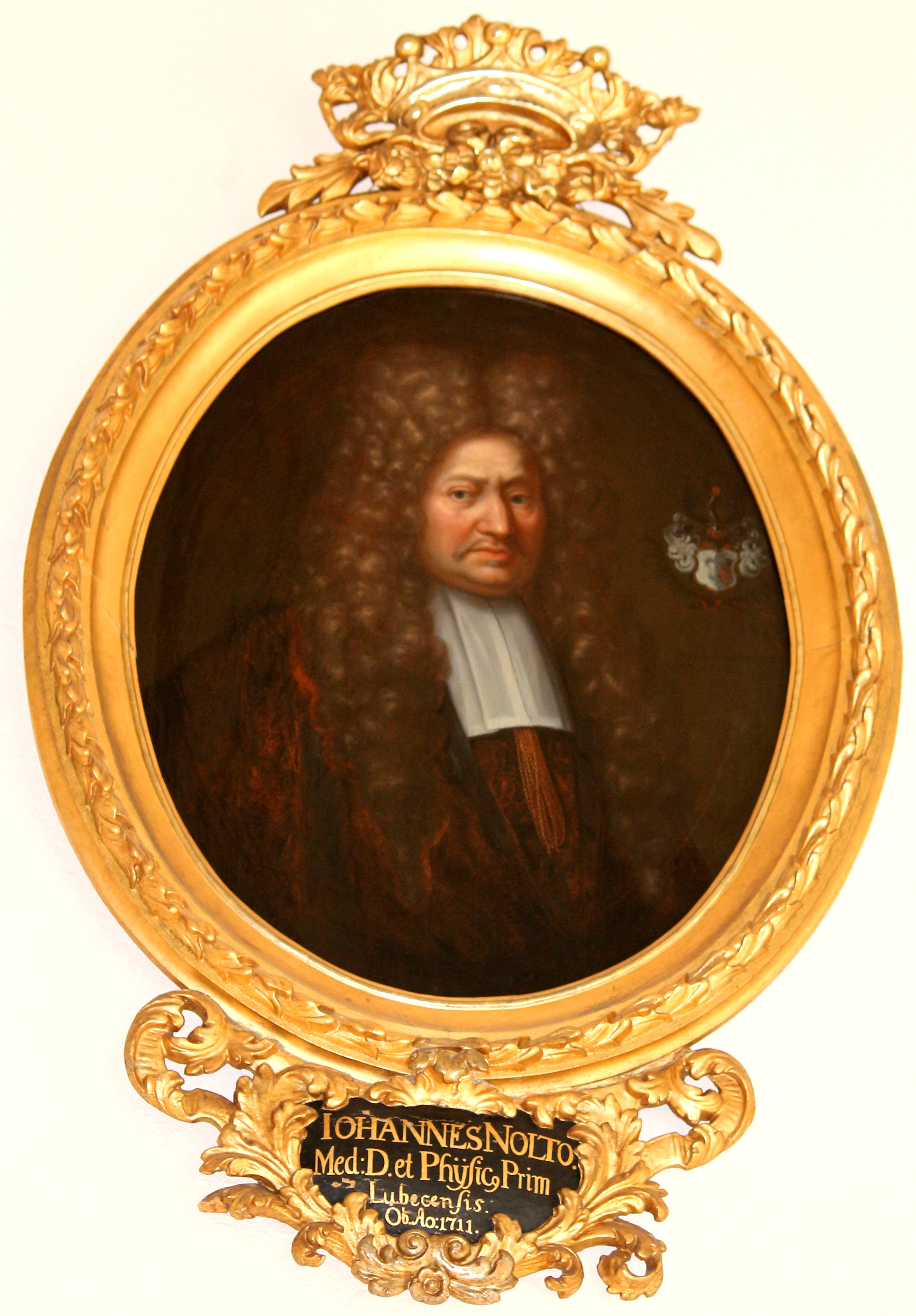 Der Arzt Johannes Nolto (1638 - 1711) - Gemälde im Scharbausaal der Stadtbibliothek Lübeck